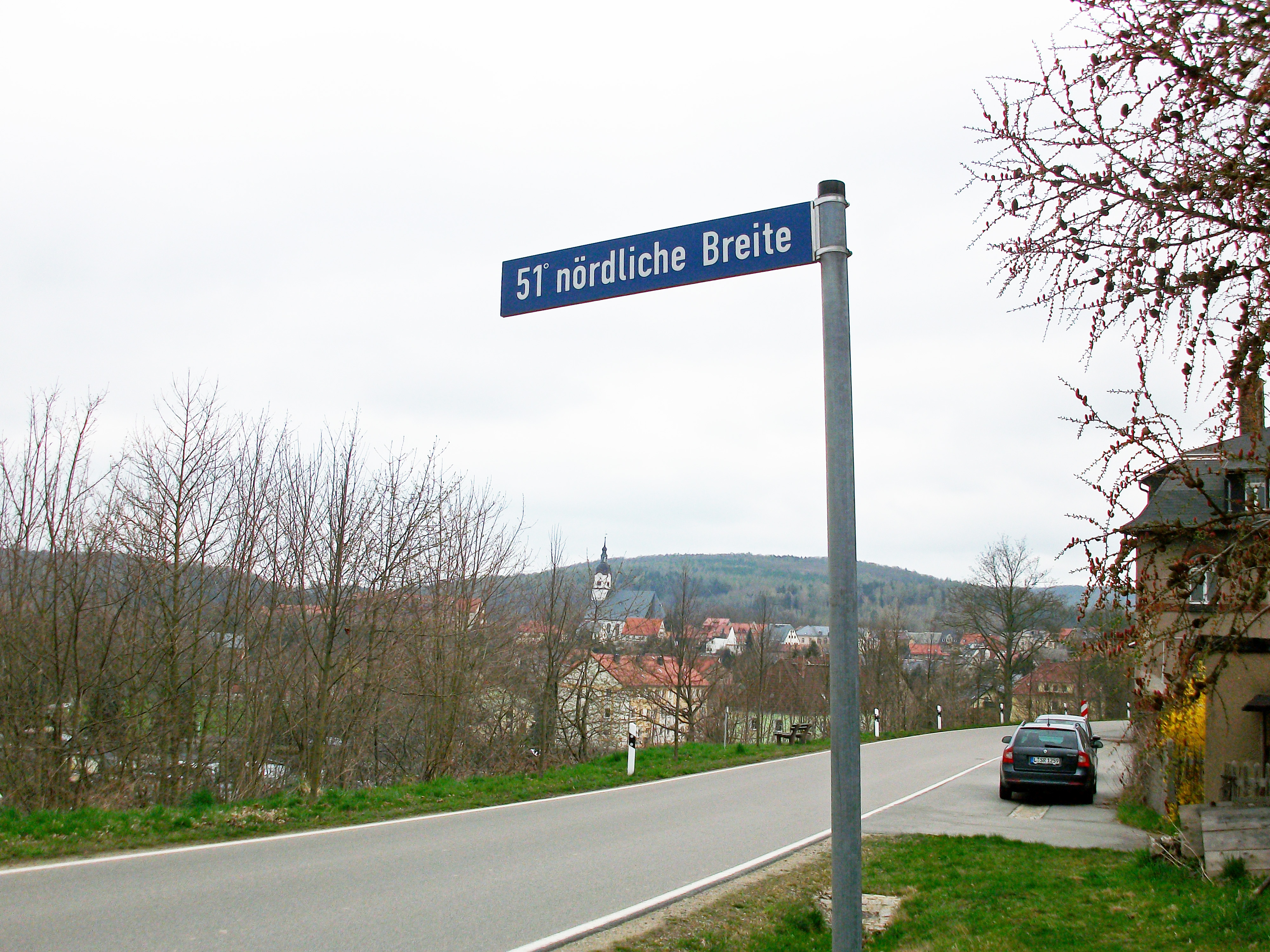 51.Breitengrad in Wechselburg